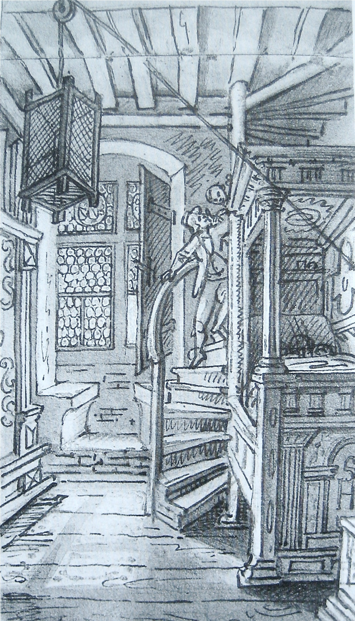 im Innern des alten Stadthauses; Zeichnung von Ludwig Vogel